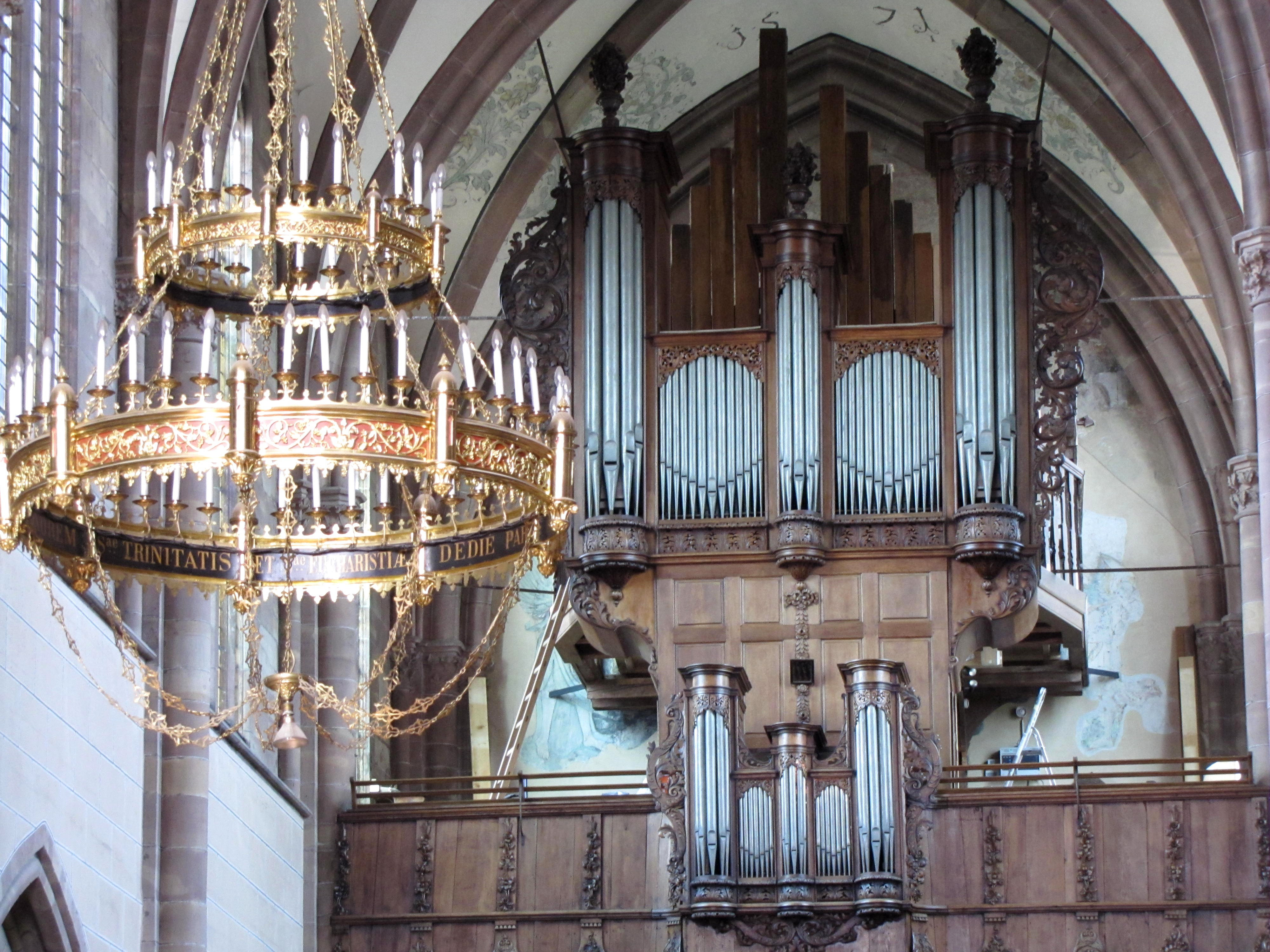 Alsace, Bas-Rhin, Abbatiale Saint-Étienne de Marmoutier (PA00084783, IA67007715). Orgue Andreas et Johann-Andreas Silbermann (1710-1746): This object is classé Monument Historique in the base Palissy, database of the French furniture patrimony of the French ministry of culture, under the references PM67001051 and IM67011808. This object is classé Monument Historique in the base Palissy, database of the French furniture patrimony of the French ministry of culture, under the references buffet + garde-corps PM67000163 buffet + garde-corps and instrument PM67000161 instrument.